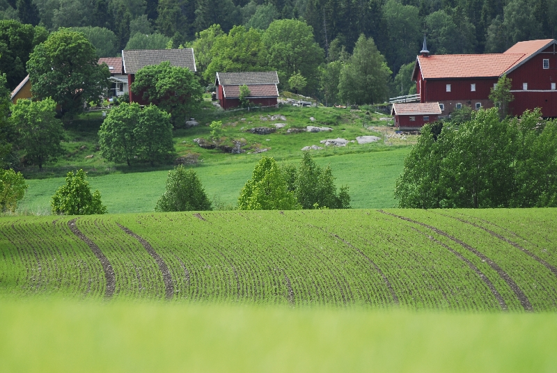 Norsk kornlandskap